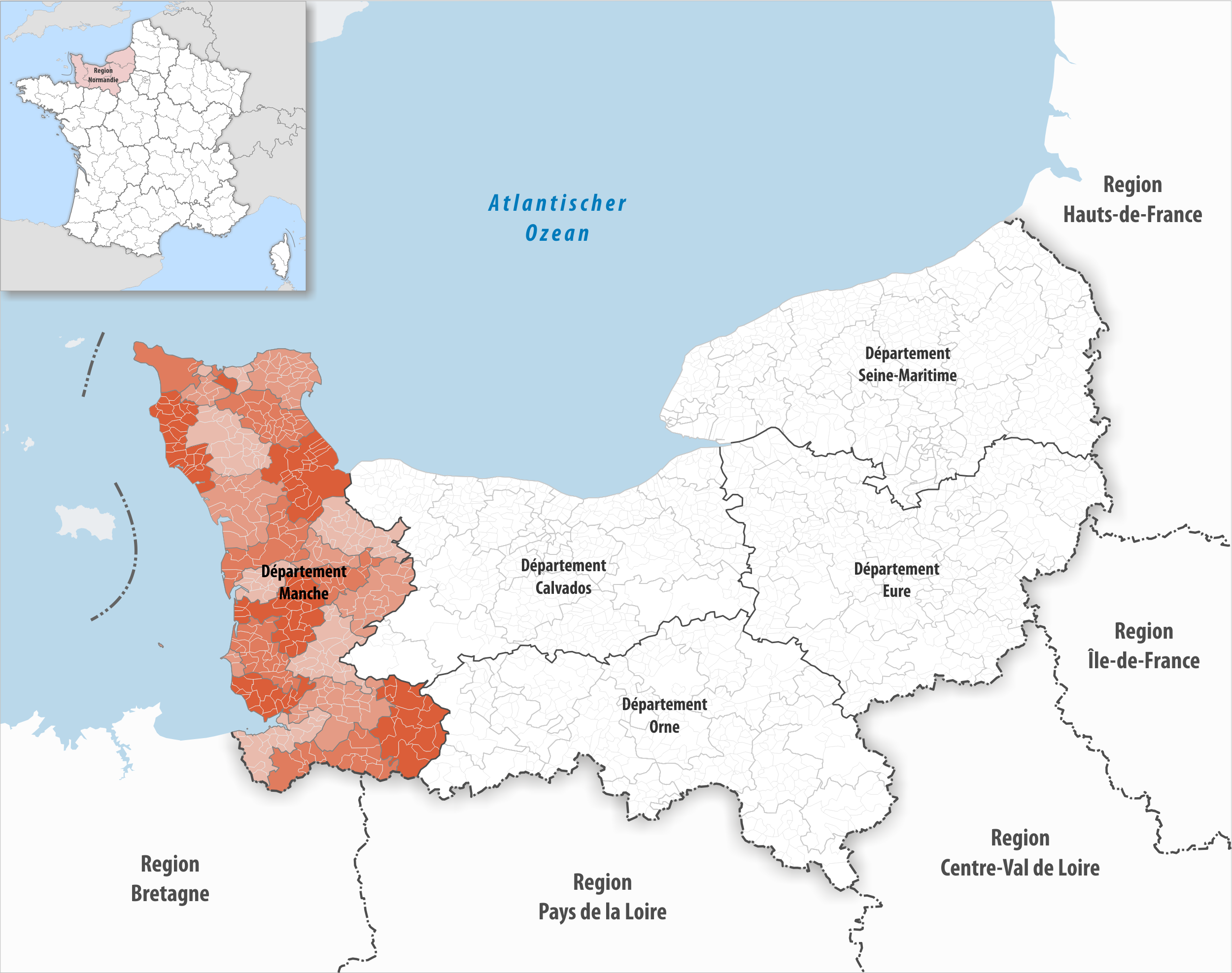 Lage des Departements Manche